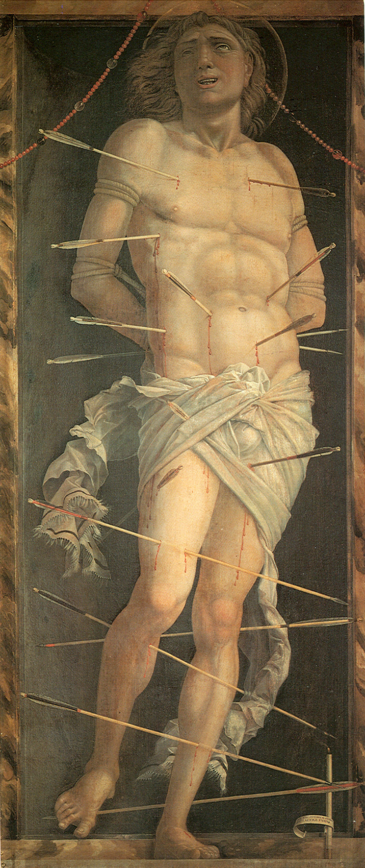 San Sebastiano di Andrea Manetegna, esposto nel museo della Ca' d'oro, a Venezia.